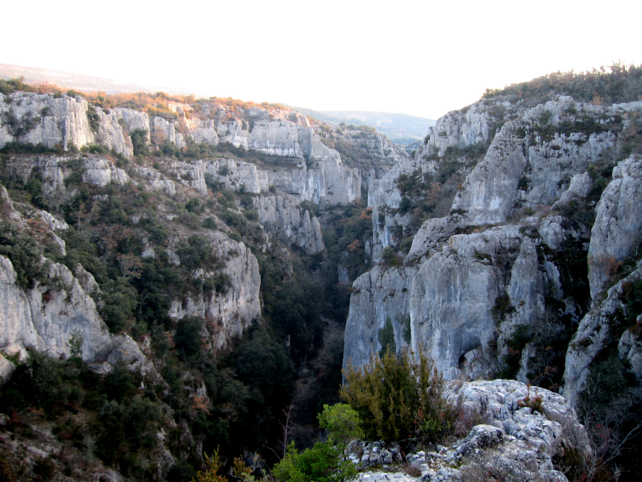 Gorge d'Oppedette